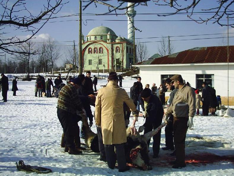 Kurban Bayramı